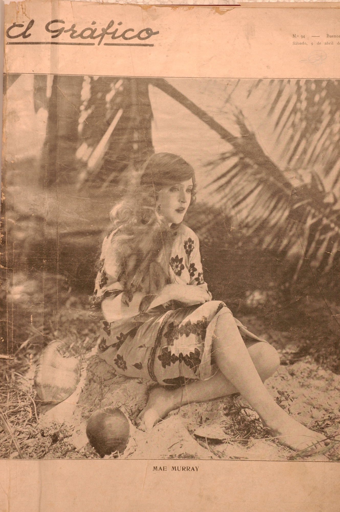 El Grafico del 09 de Abril de 1921. Edicion 94